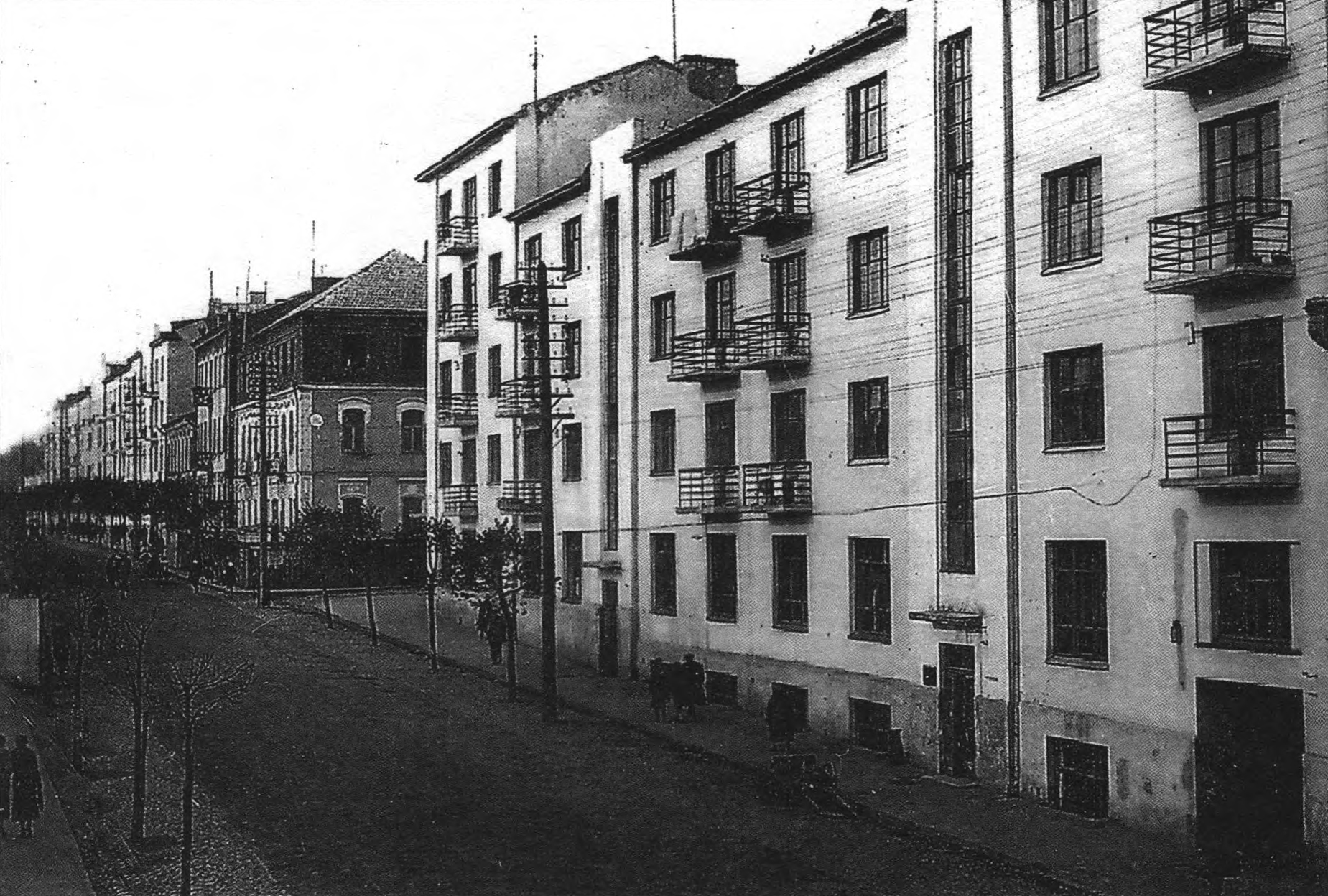 Беларуская (тарашкевіца): Менск (Miensk), вуліца Падгорная (vulica Padhornaja) каля скрыжаваньня з Фэліцыянаўскай (vulica Felicyjanaŭskaja)